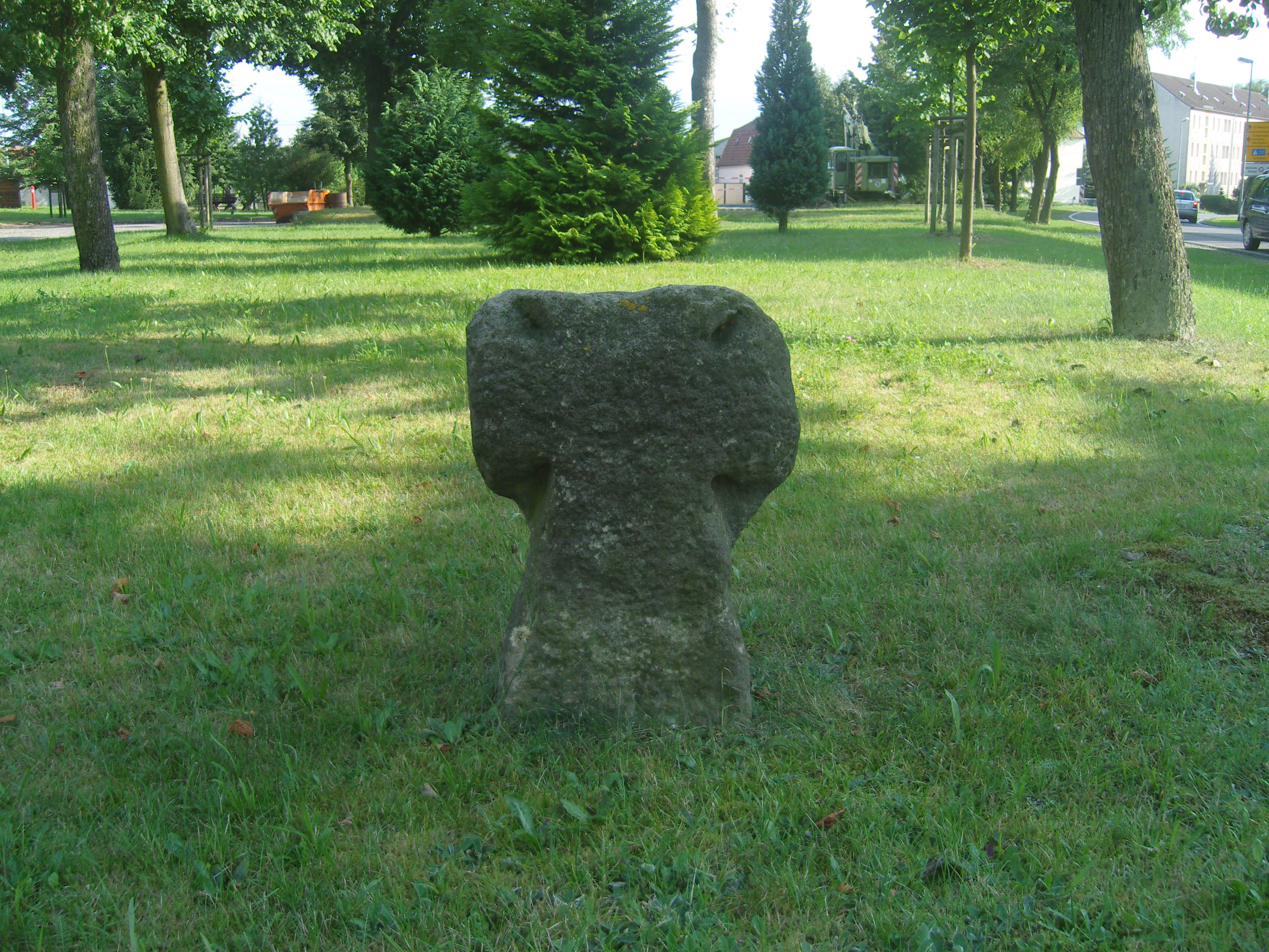 Steinkreuz in Grünewald an der Straße nach Hohenbocka